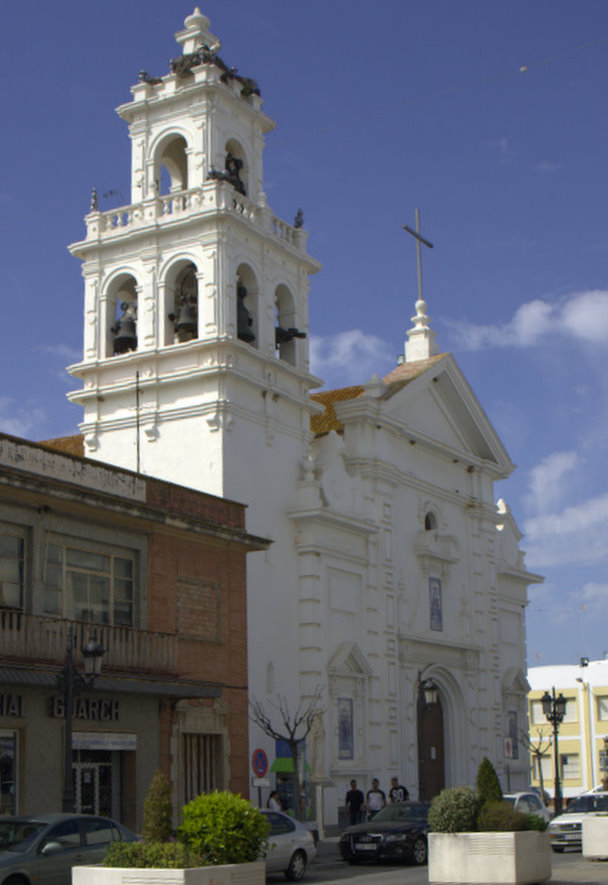 Parroquia Nuestra Señora de los Dolores de Isla Cristina, desde la Gran Vía de Román Pérez.